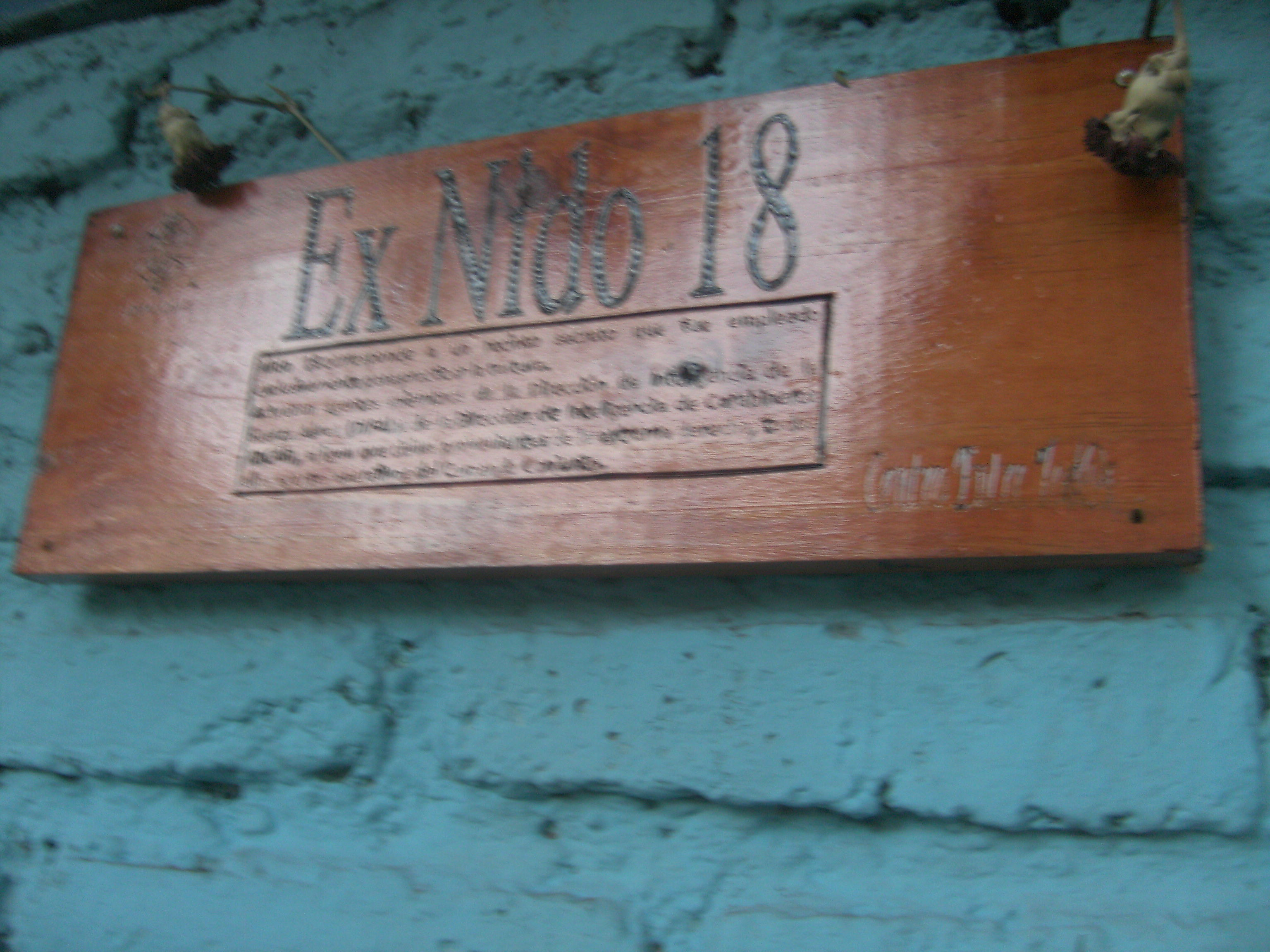 Placas y animita en recuerdo de´centro de detención clandestino "Nido 18" del régimen militar chileno de Pinochet. Està ubicada en calle Perú, La Florida, frente al paradero 18 de autobuses, de ahí el nombre.